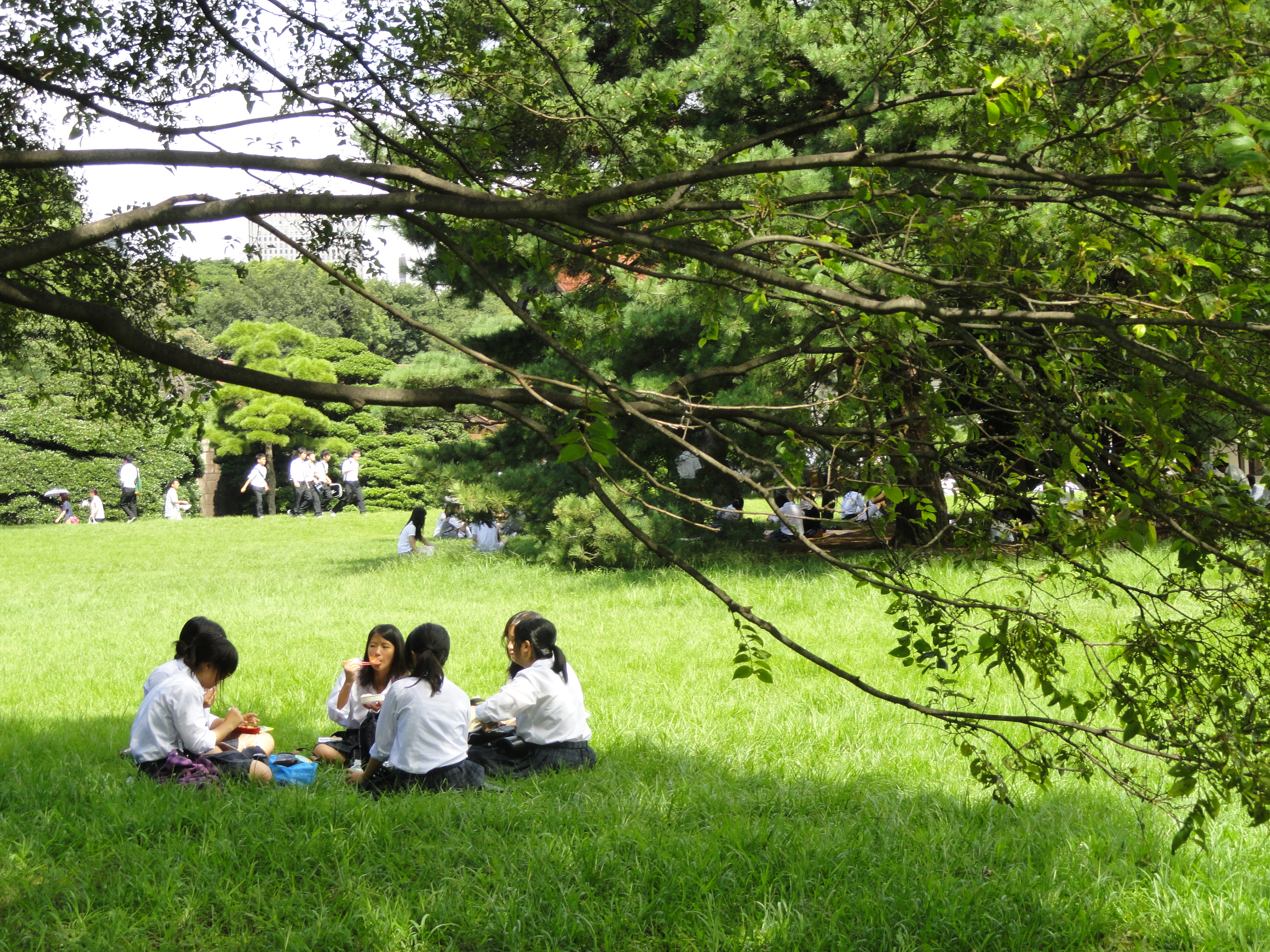 Meiji Shrine, Shinjuku, Tokyo, Japan.